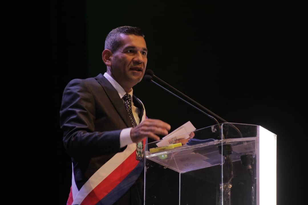 Alcalde de Maracaibo Willy Casanova